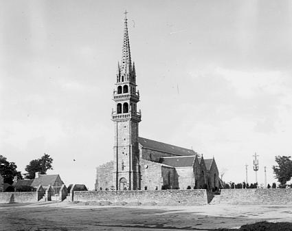 Plounéventer : l'église en 1900 (photo de Petit